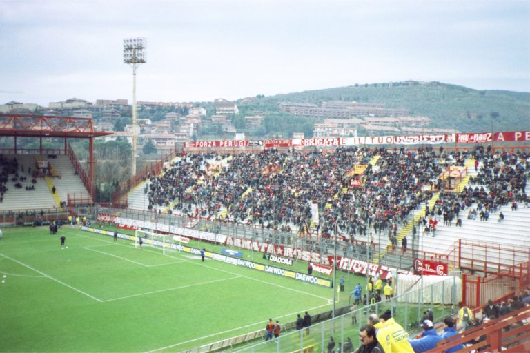 Curva Nord des Fußballstadions Renato Curi im italienischen Perugia kurz vor dem Spiel Perugia - Udinese am 7. Januar 2001